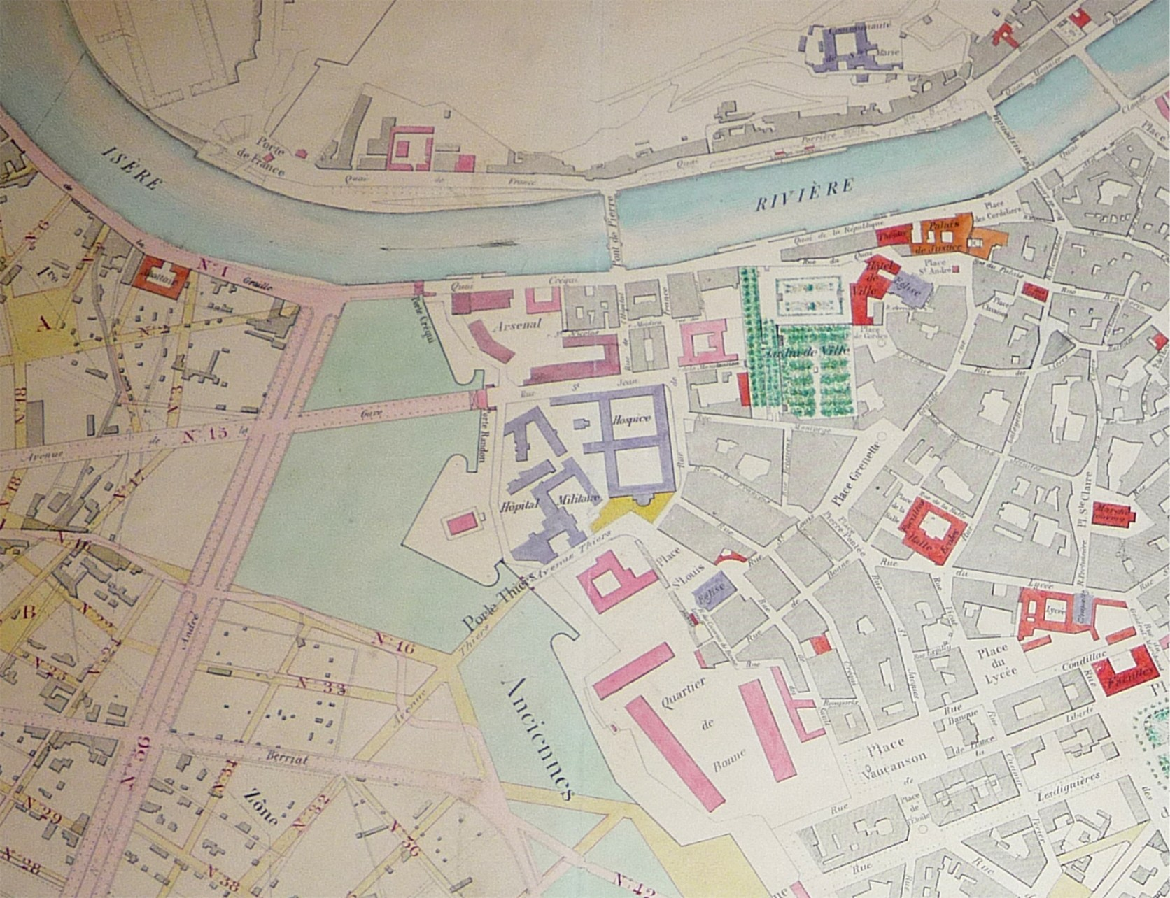 Extrait du plan de la ville de Grenoble en 1878. Au centre de la photo, en violet, les hopitaux civils et militaires de la ville. Les fortifications visibles au centre de l'image sont celles du général Haxo (1832-1836). Elles bordaient encore la caserne de Bonne avant son déménagement plus au sud en 1884.